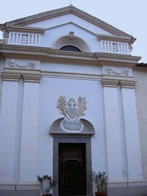 photo de l'église des passionistes du mont Argentario